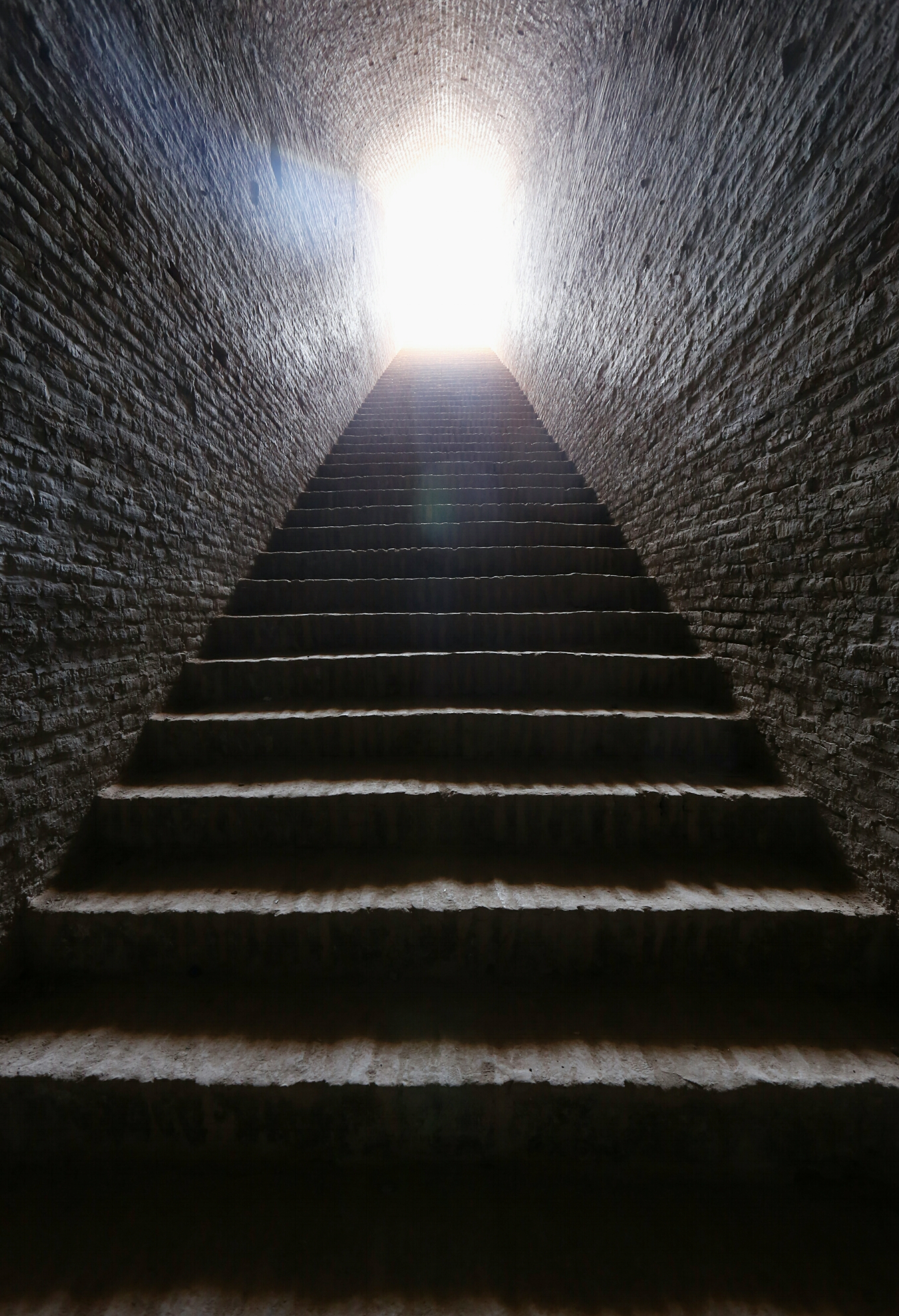 آب‌انبار حاج محمد تقی